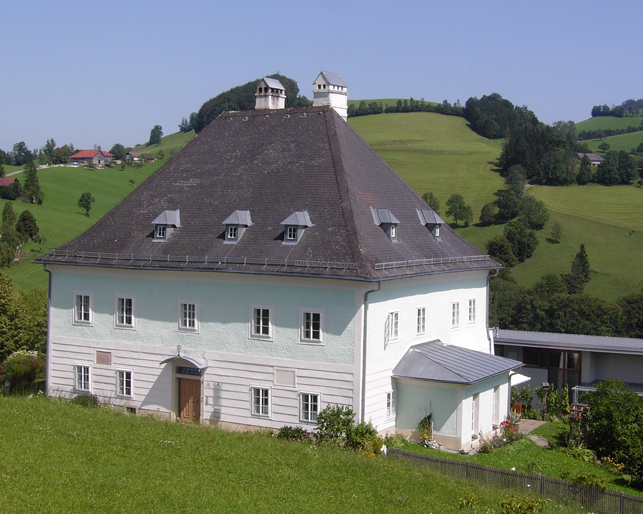 Maria Neustift Pfarrhof Neustift 28